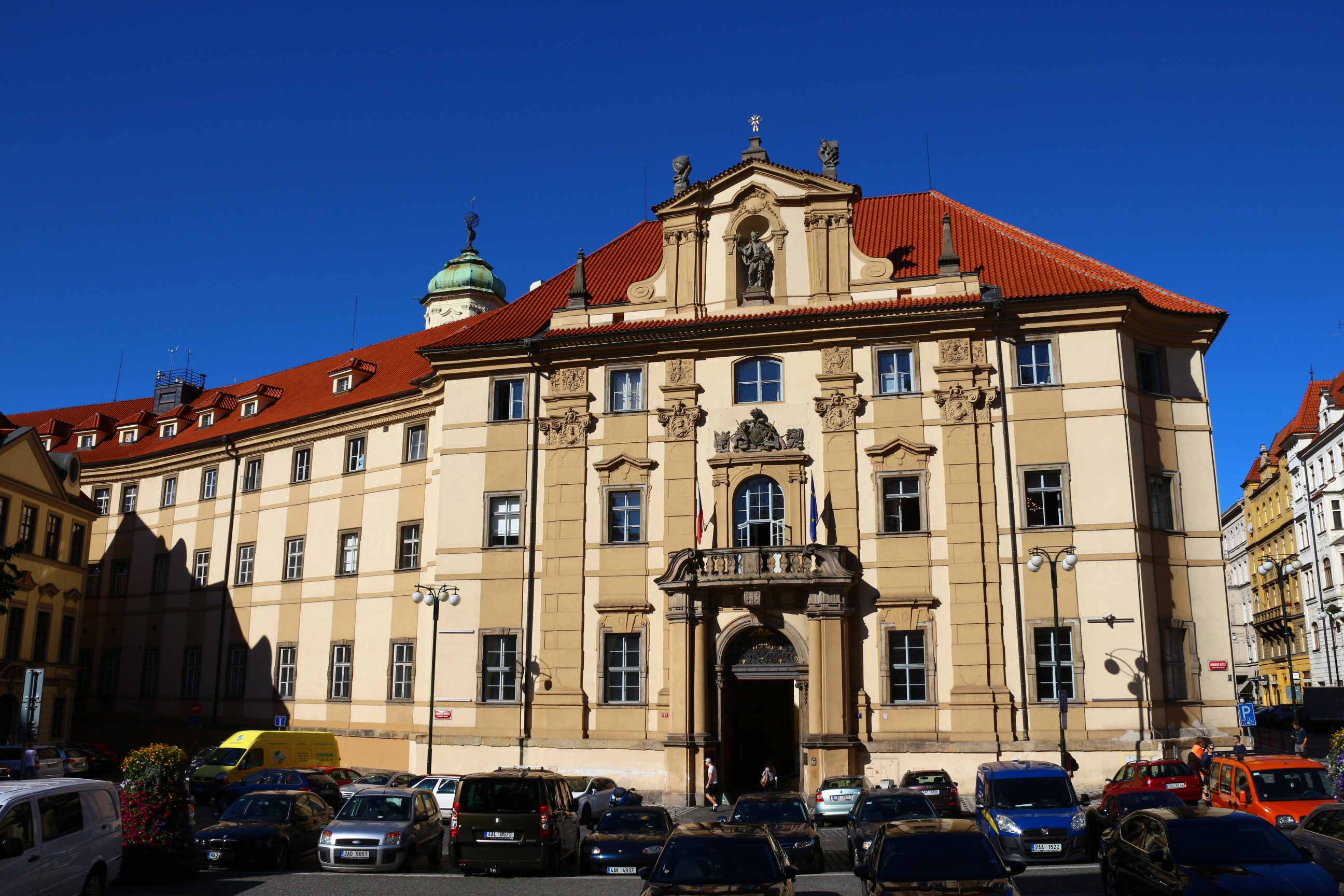 KlementinumБеларуская (тарашкевіца): Клемэнтынум